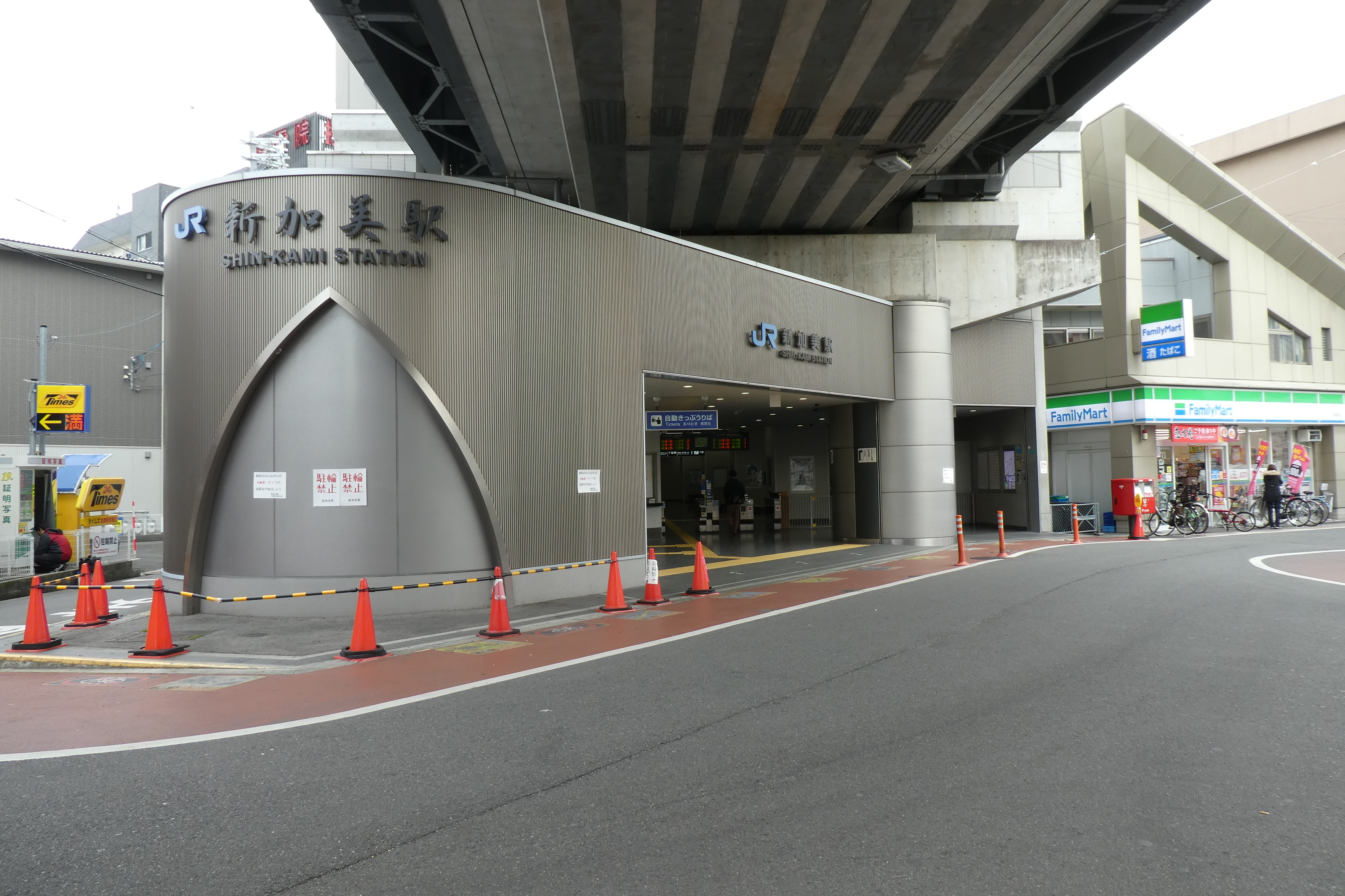 おおさか東線、新加美駅 駅舎